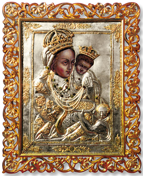 Маці Божая Лагішынская